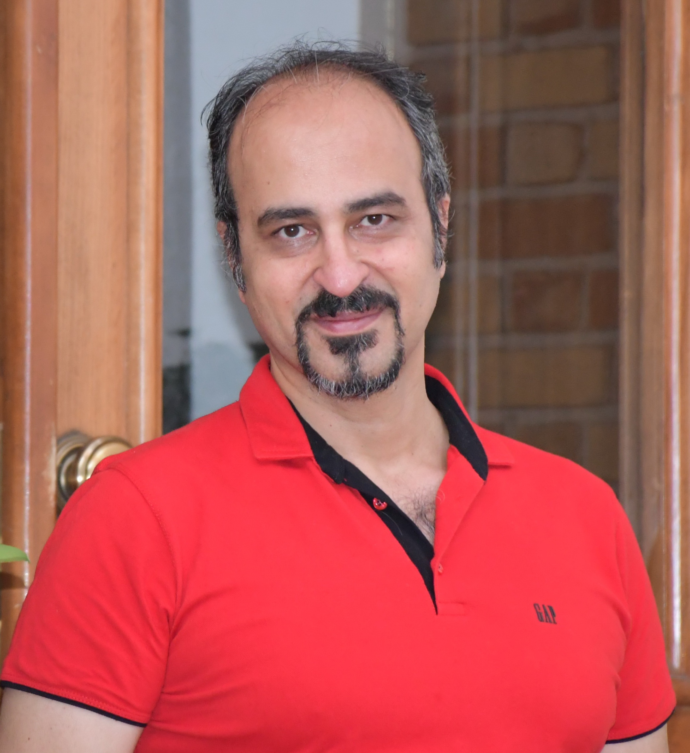 بهنام صبوحی خانه سینما تیر ماه ۱۳۹۷